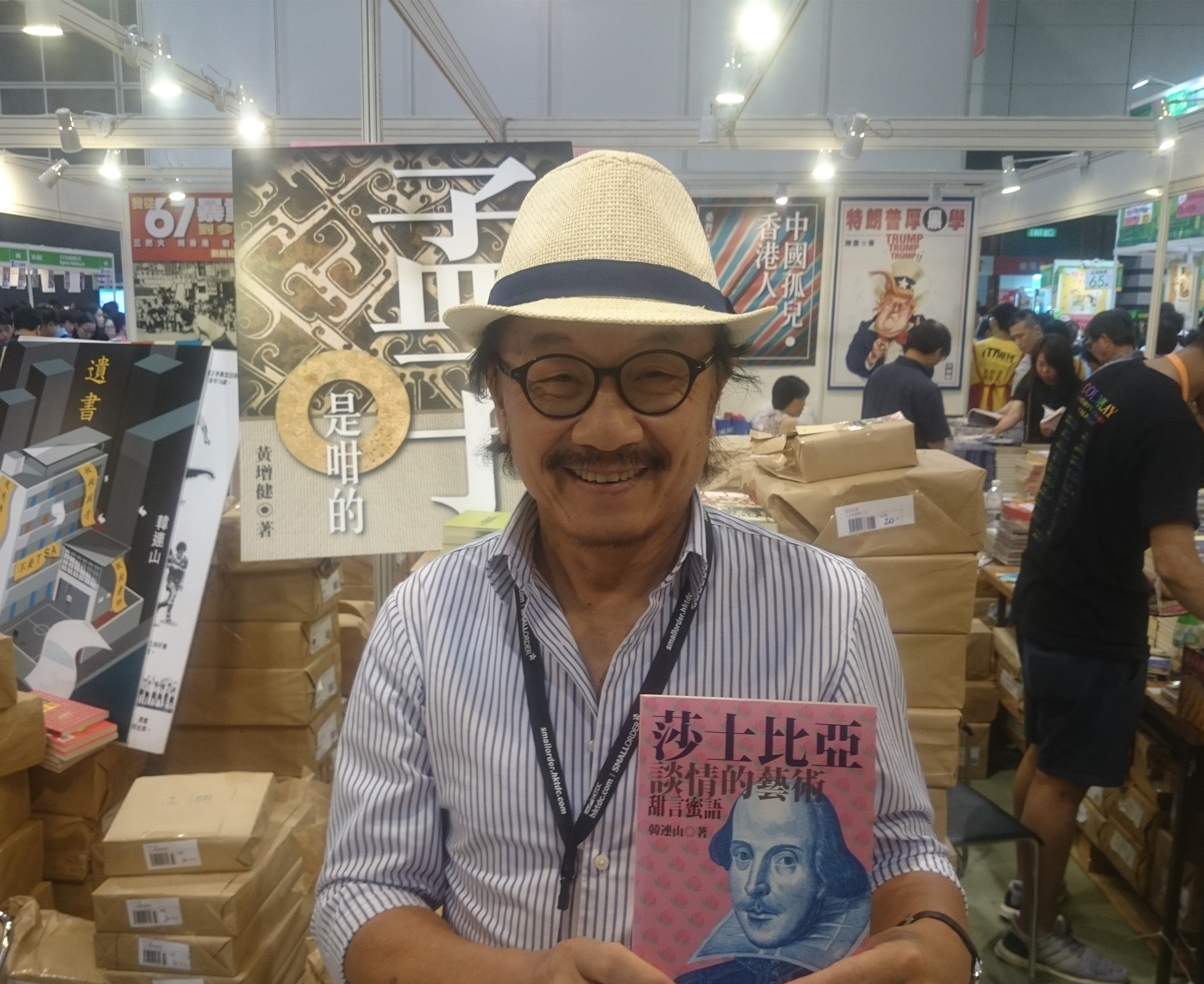 粵語: 韓連山喺2017年7月24號下畫喺次文化堂個書展攤位度。